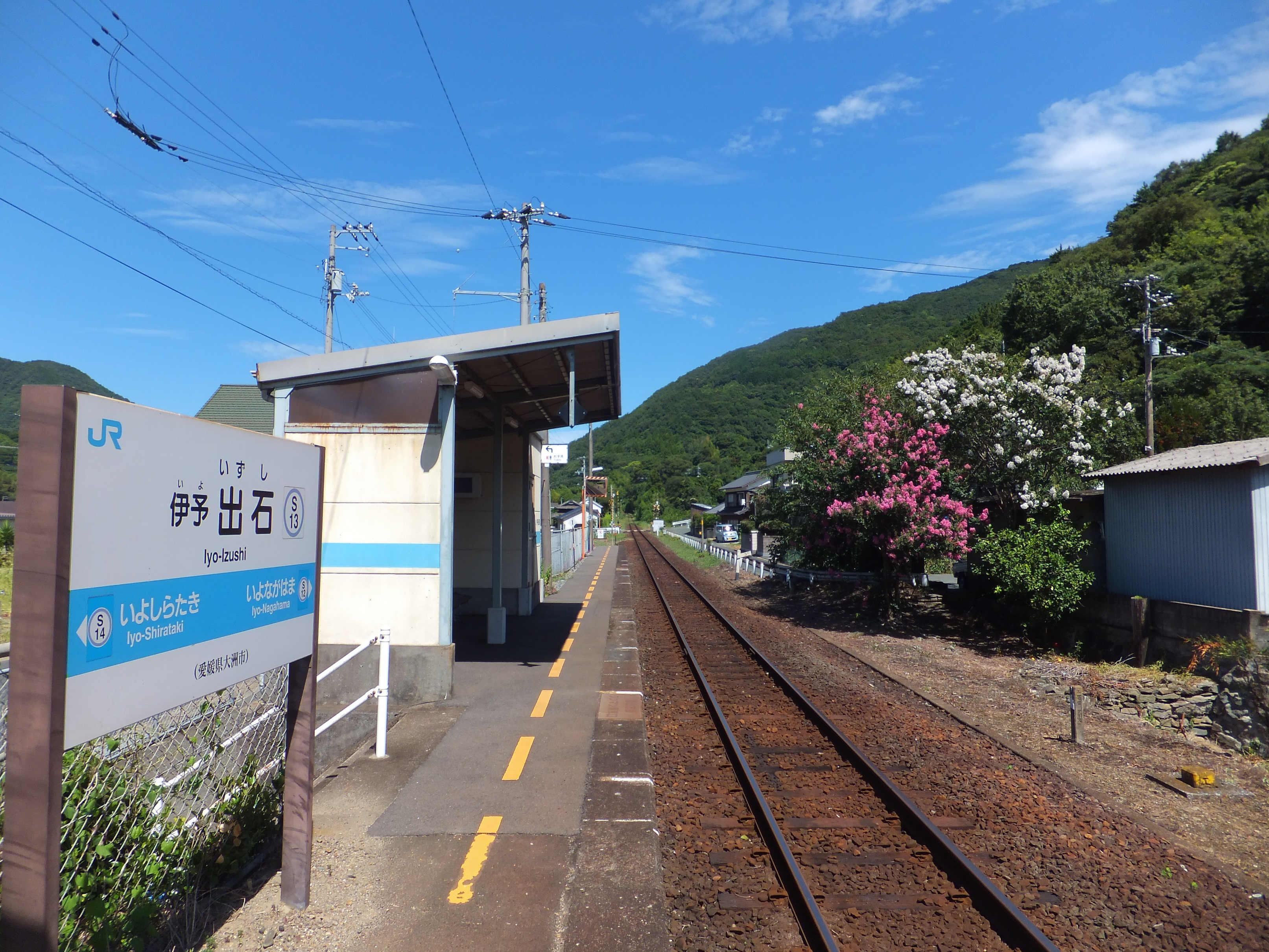 愛媛県大洲市 JR四国 予讃線 伊予出石駅